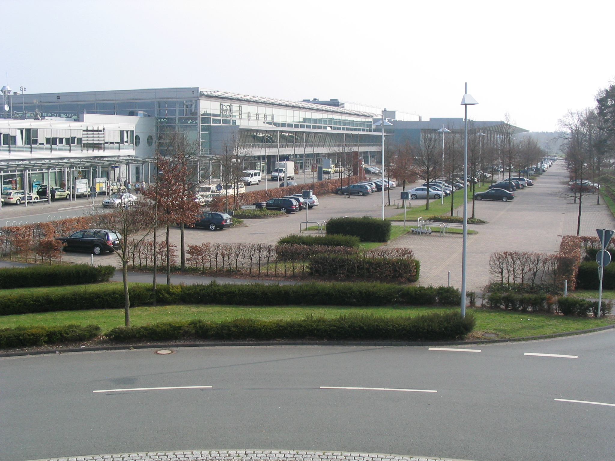 Flughafen Münster Osnabrück, Terminal I + II, 24.04.2006